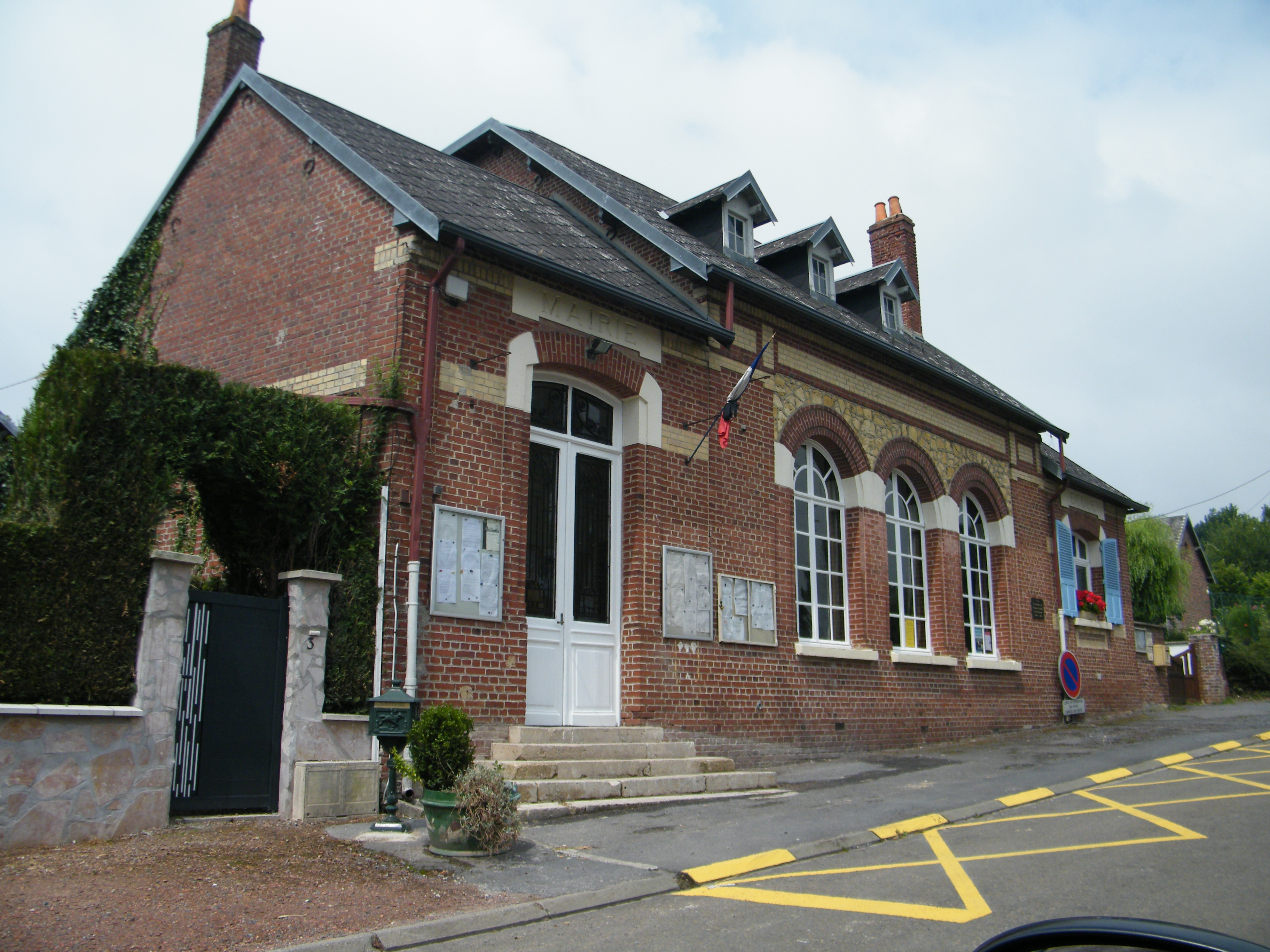 Mairie-école.